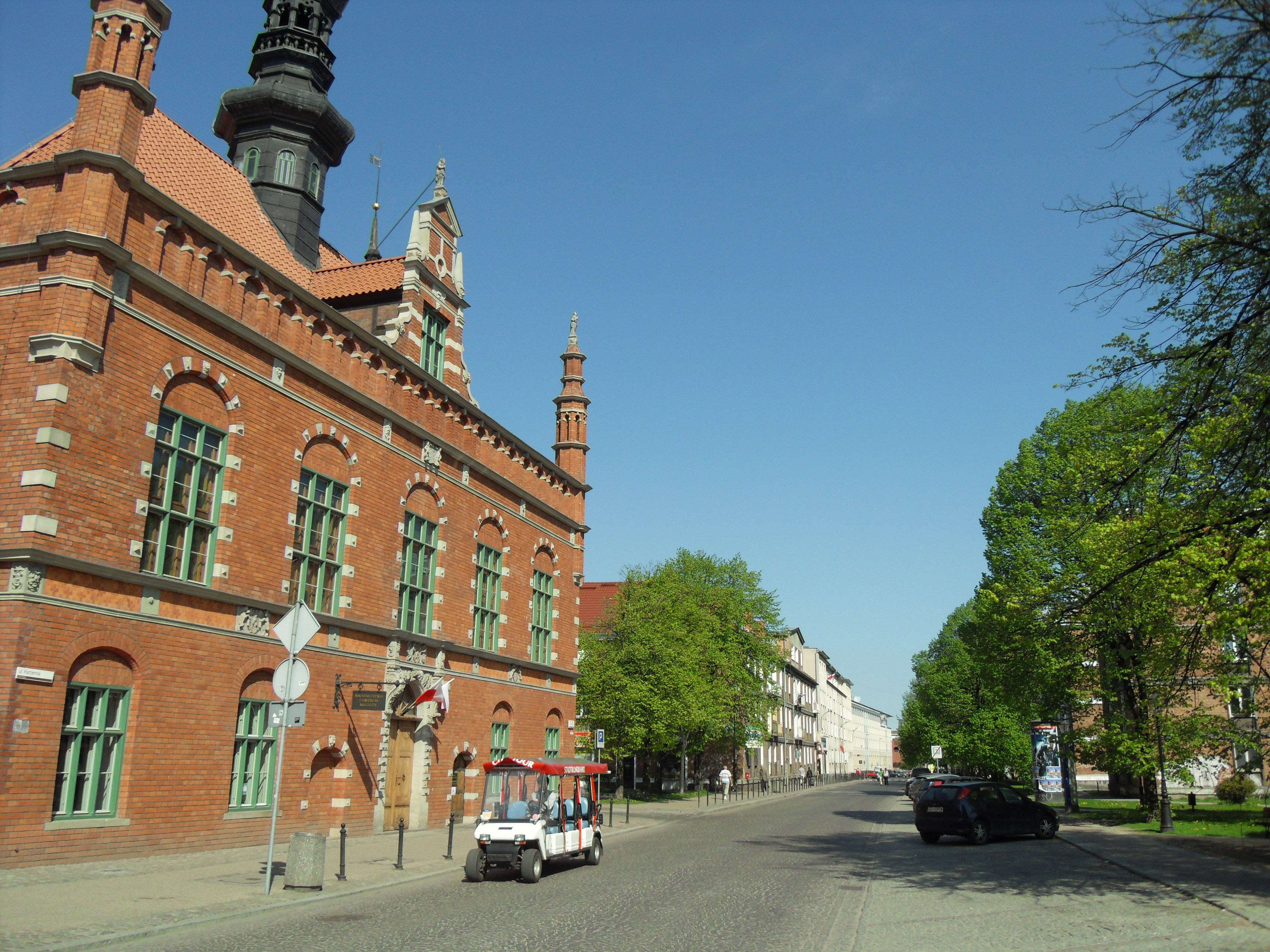 Gdańsk Stare Miasto, ul. Korzenna.